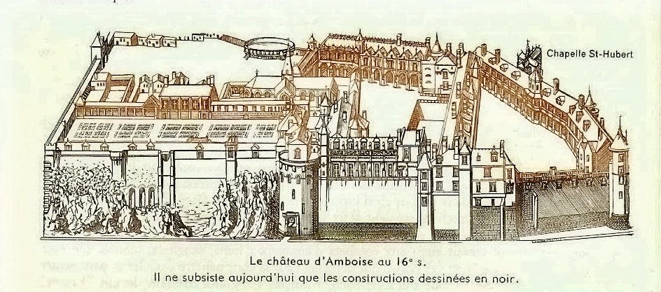 Le château d'Amboise au 16e siècle